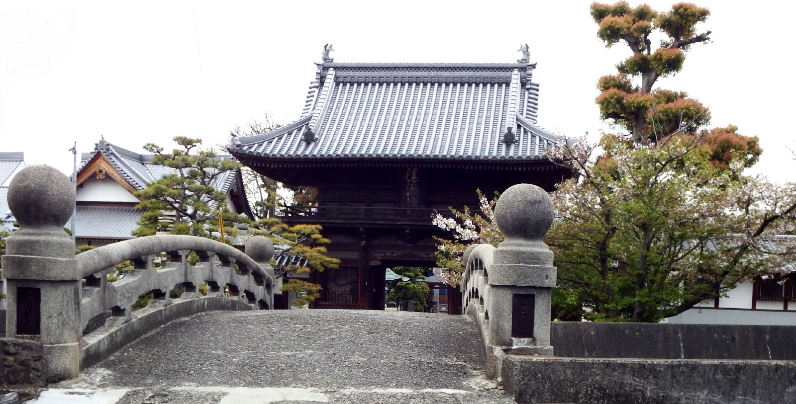 西林寺橋を通って仁王門を入る